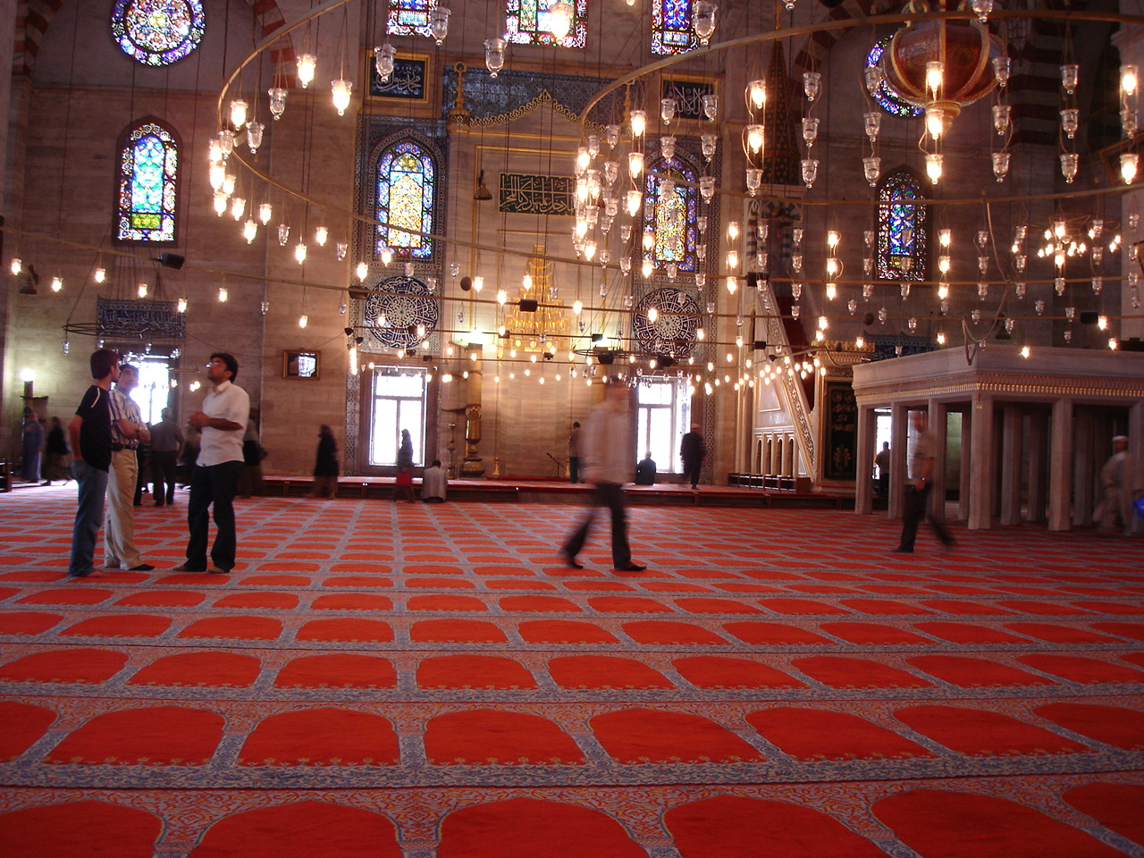 L'interno della Moschea di Solimano il Magnifico ad Istanbul, al termine della preghiera del venerdì. Foto di: Giovanni Dall'Orto, 26-5-2006.